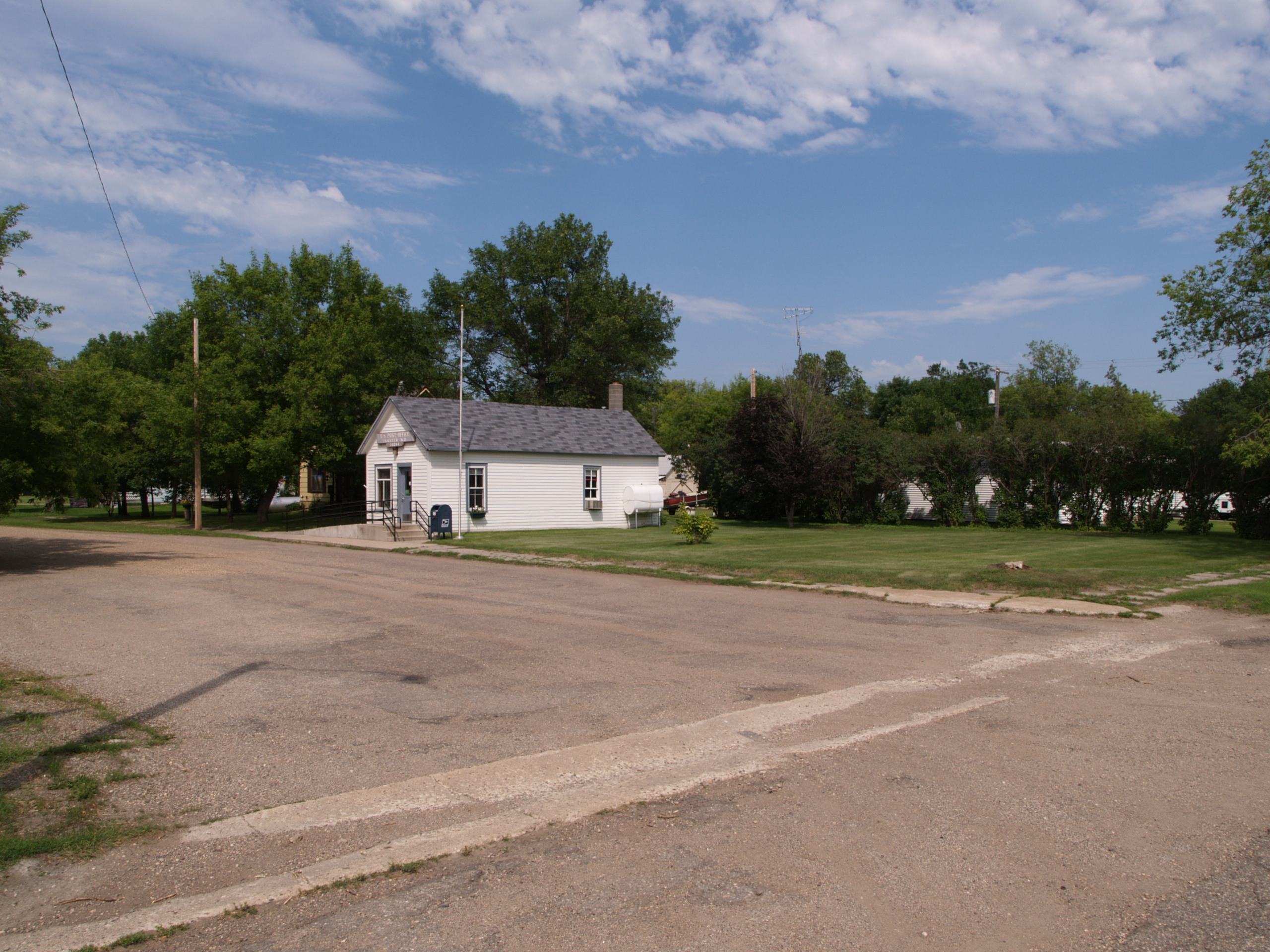 Inkster, North Dakota. From .